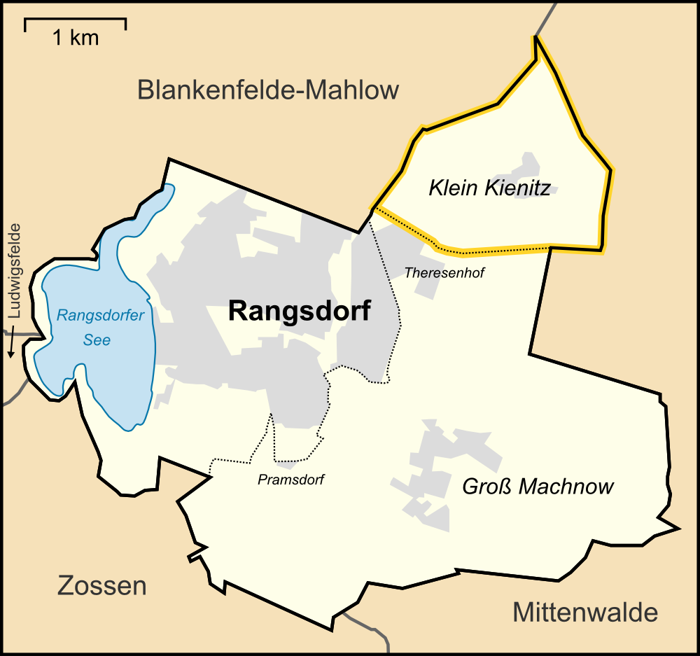 Karte des Ortsteils Klein Kienitz der Gemeinde Rangsdorf.